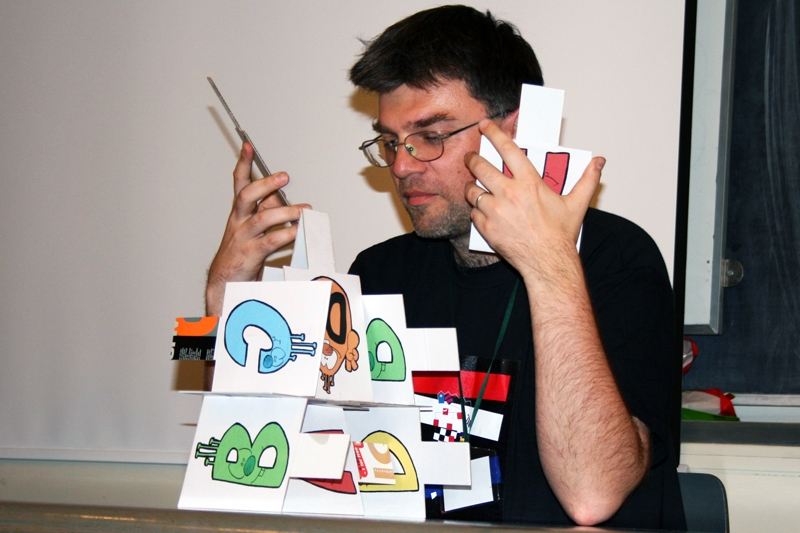 Sferakon 2011.